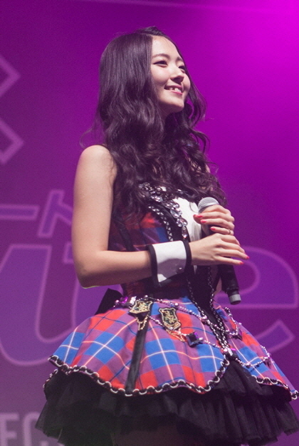 Berryz Kobo x °C-ute